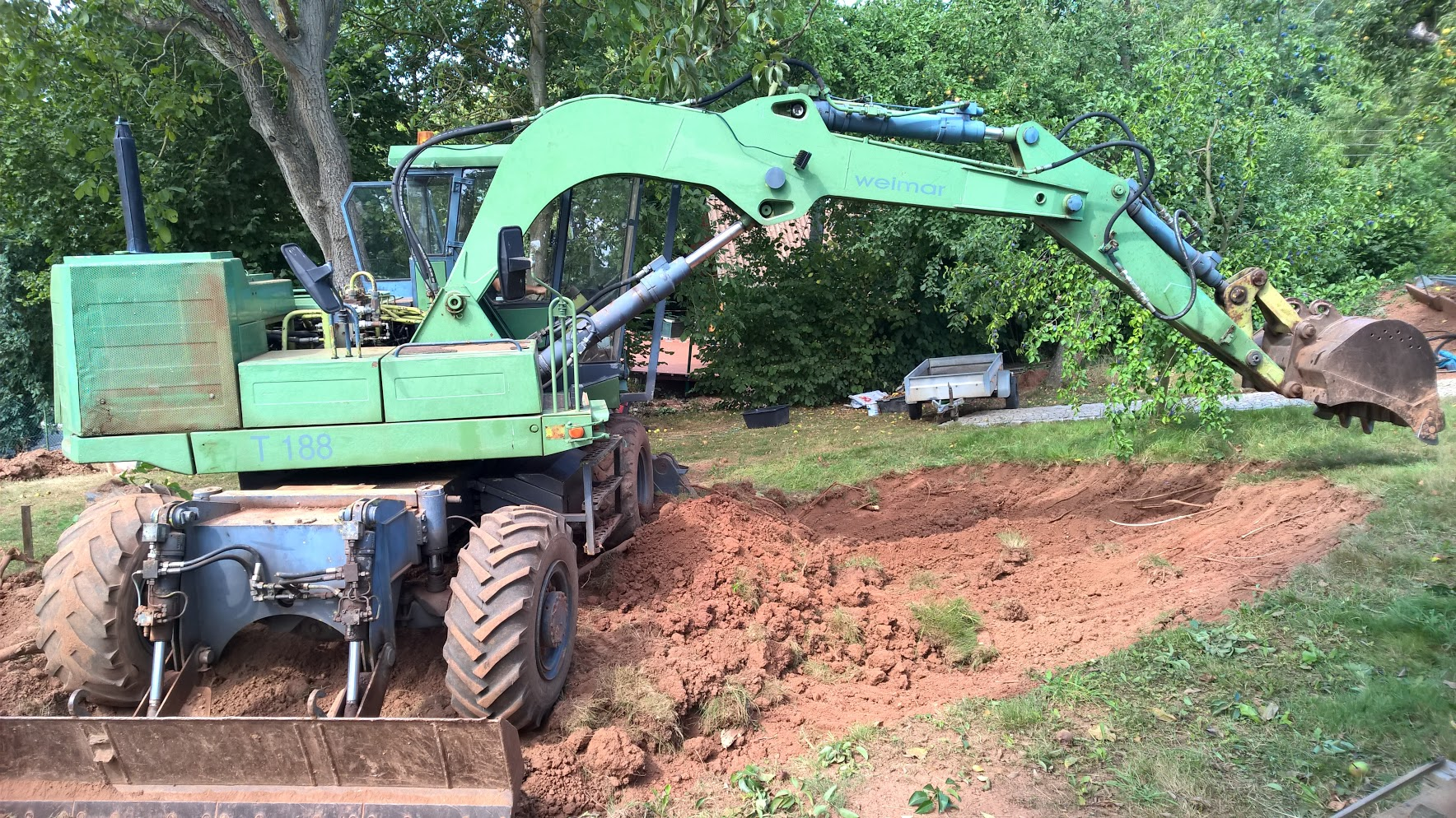 Weimar T 188 Mobilbagger in der Version A03 mit dem selten verbauten Monoblockausleger